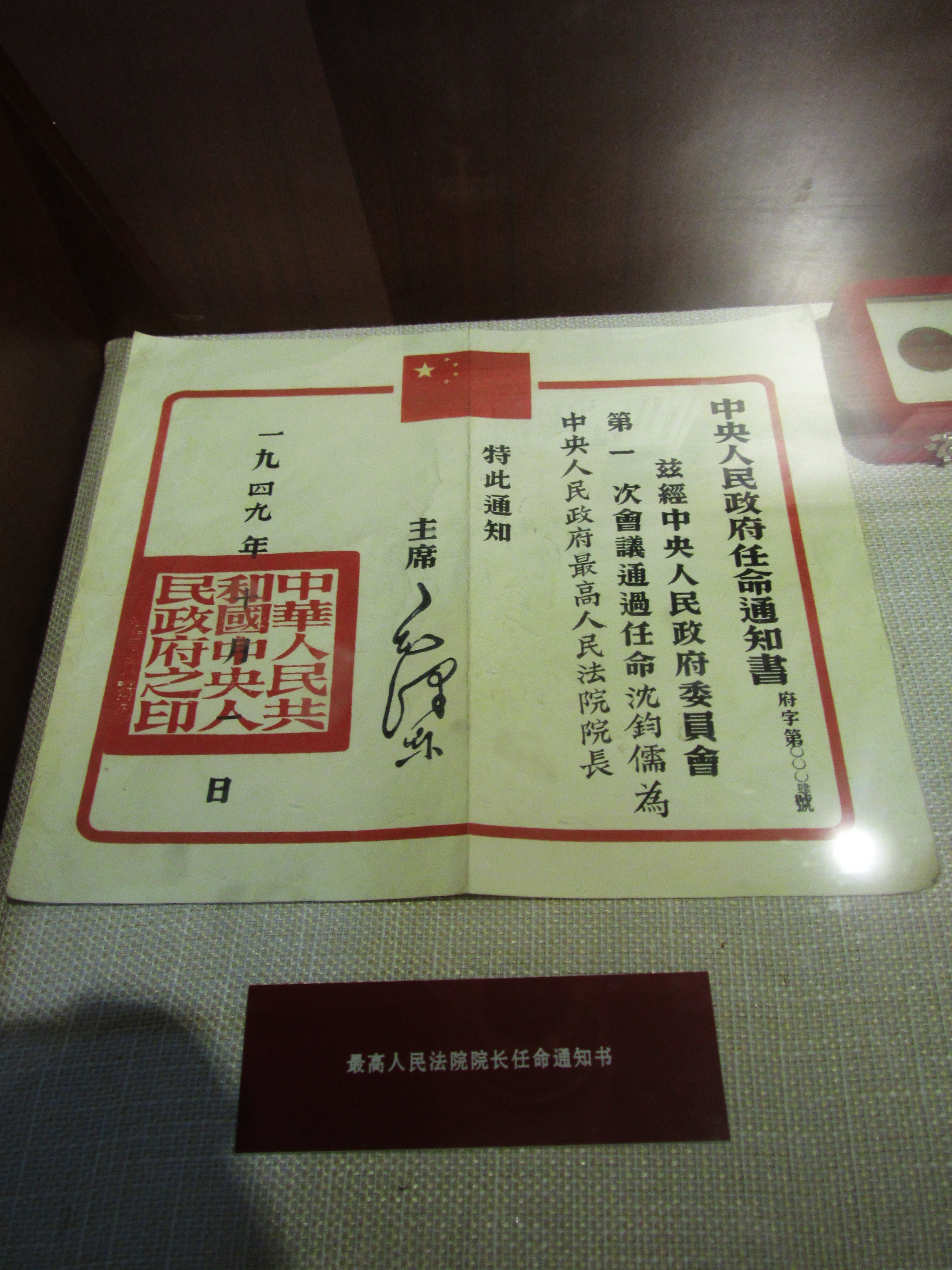 1949年10月1日，沈钧儒的最高人民法院院长任命通知书，沈钧儒故居藏。